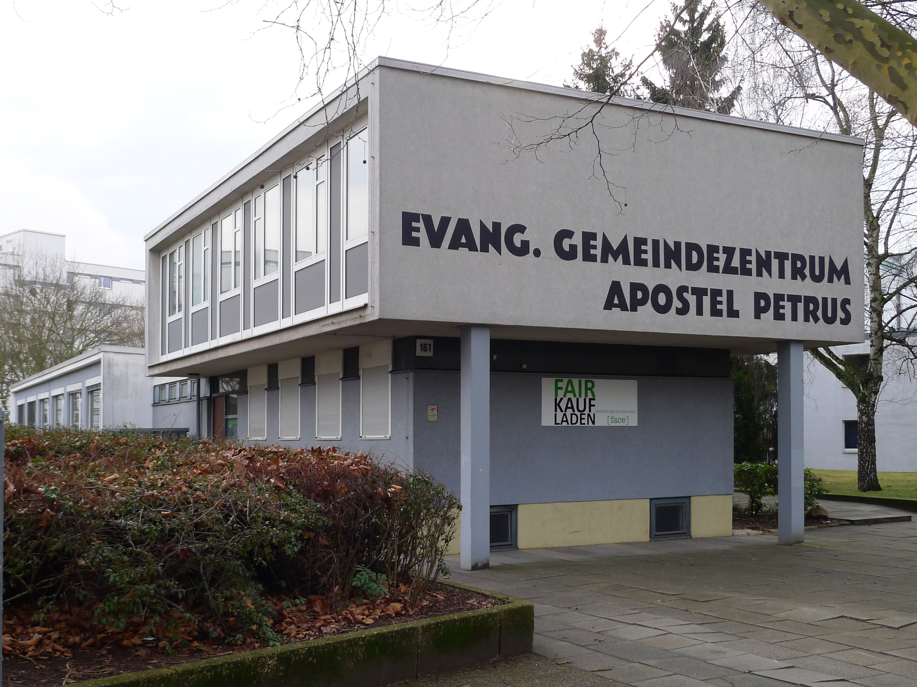 Fassade des Gemeindezentrums